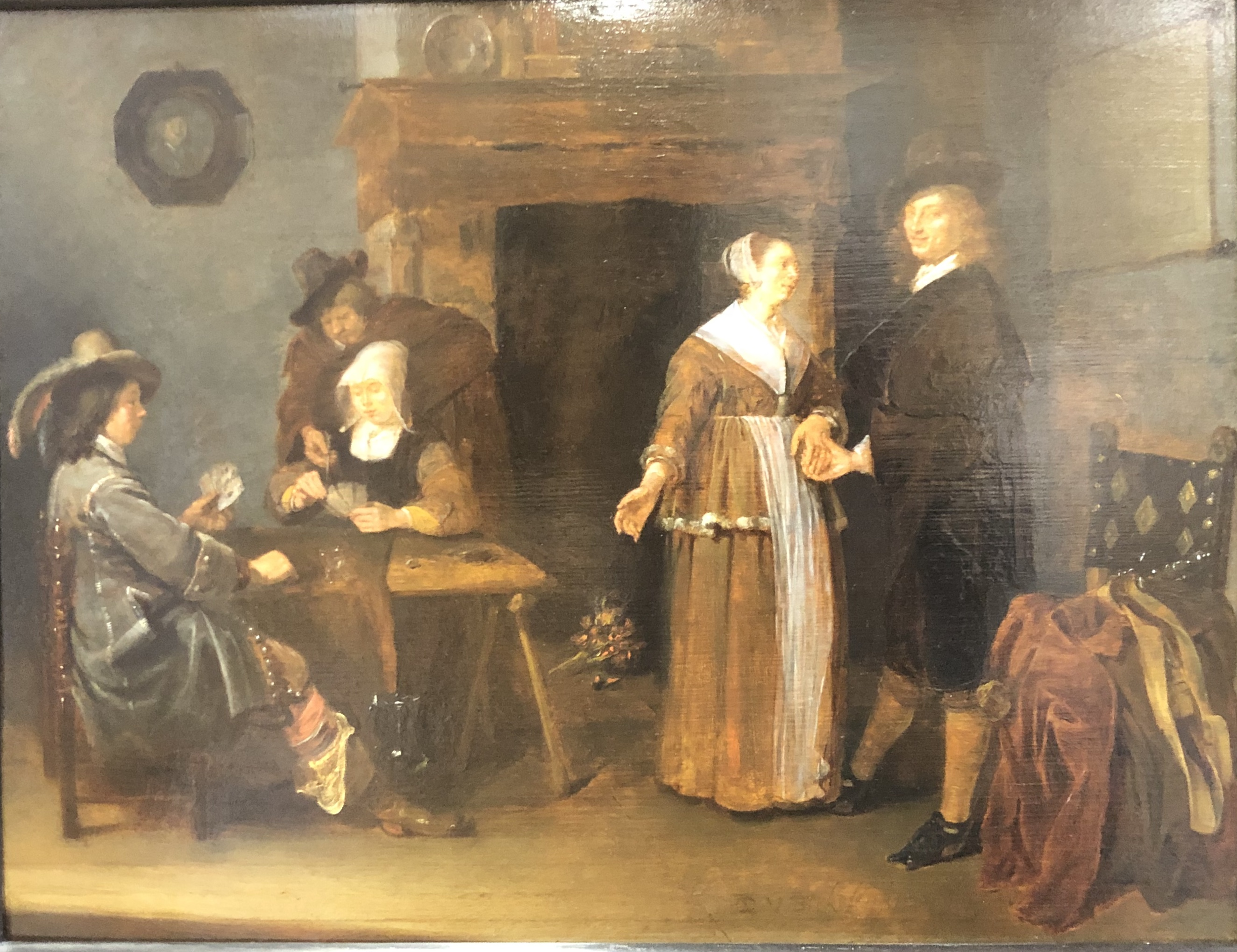 Vermeer übernimmt den linken Teils dieser Komposition mit der männlichen Figur mit dem Hut auf der linken Seite und der erhobenen Hand, der sitzenden Frau mit ihrem nach unten gerichteten Blick und dem hinter ihr stehenden Mann mit Hut als auch der amourösen und lasziven Atmosphäre und der grauen Wand im Hintergrund. (Hillegers et al. 2016, Seite